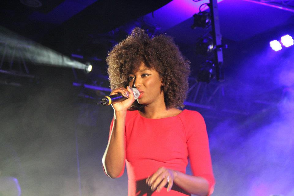 Inna Modja lors de son concert à Niort le 15/03/2012